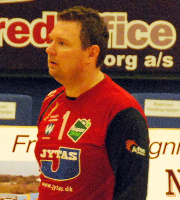 Håndboldspilleren Jan "Tromle" Nielsen fra Århus Håndbold Her i en kamp mod Viborg HK i Viborg Stadionhal.